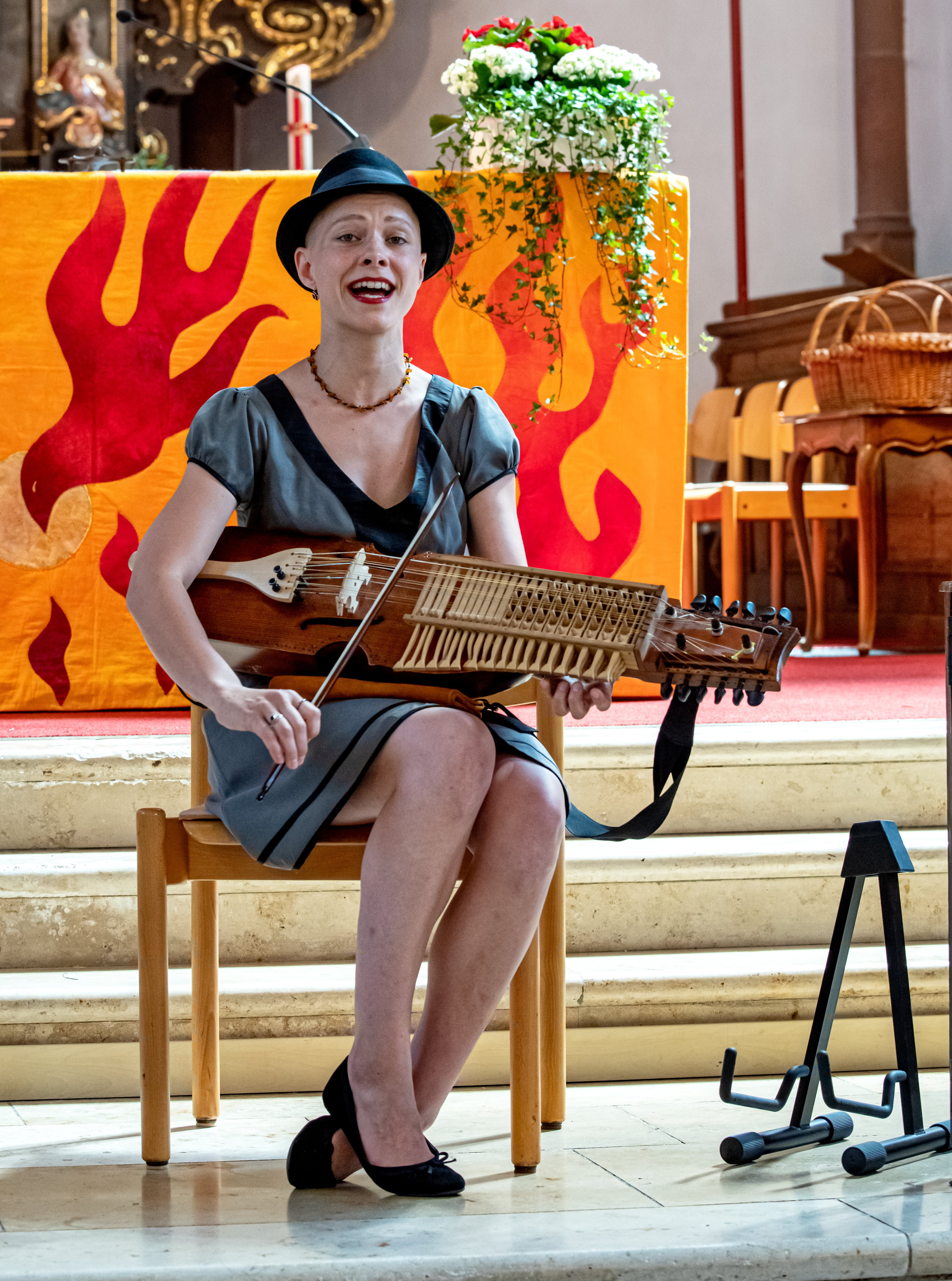 Bilder vom Black Forest Voices Festival in Kirchzarten. Ein Festival mit Workshops für Chöre und A Capella Gesang vom 27. 6. 2019 zum 30.06. 2019 Das Konzert in der Kirche St. Gallus Kirchzarten